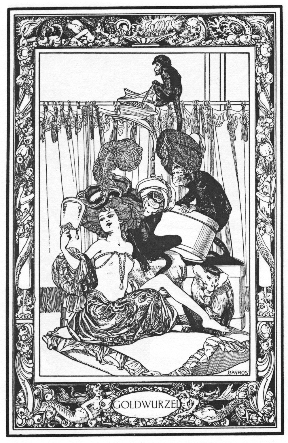 Illustration for Giambattista Basile's "Pentamerone".